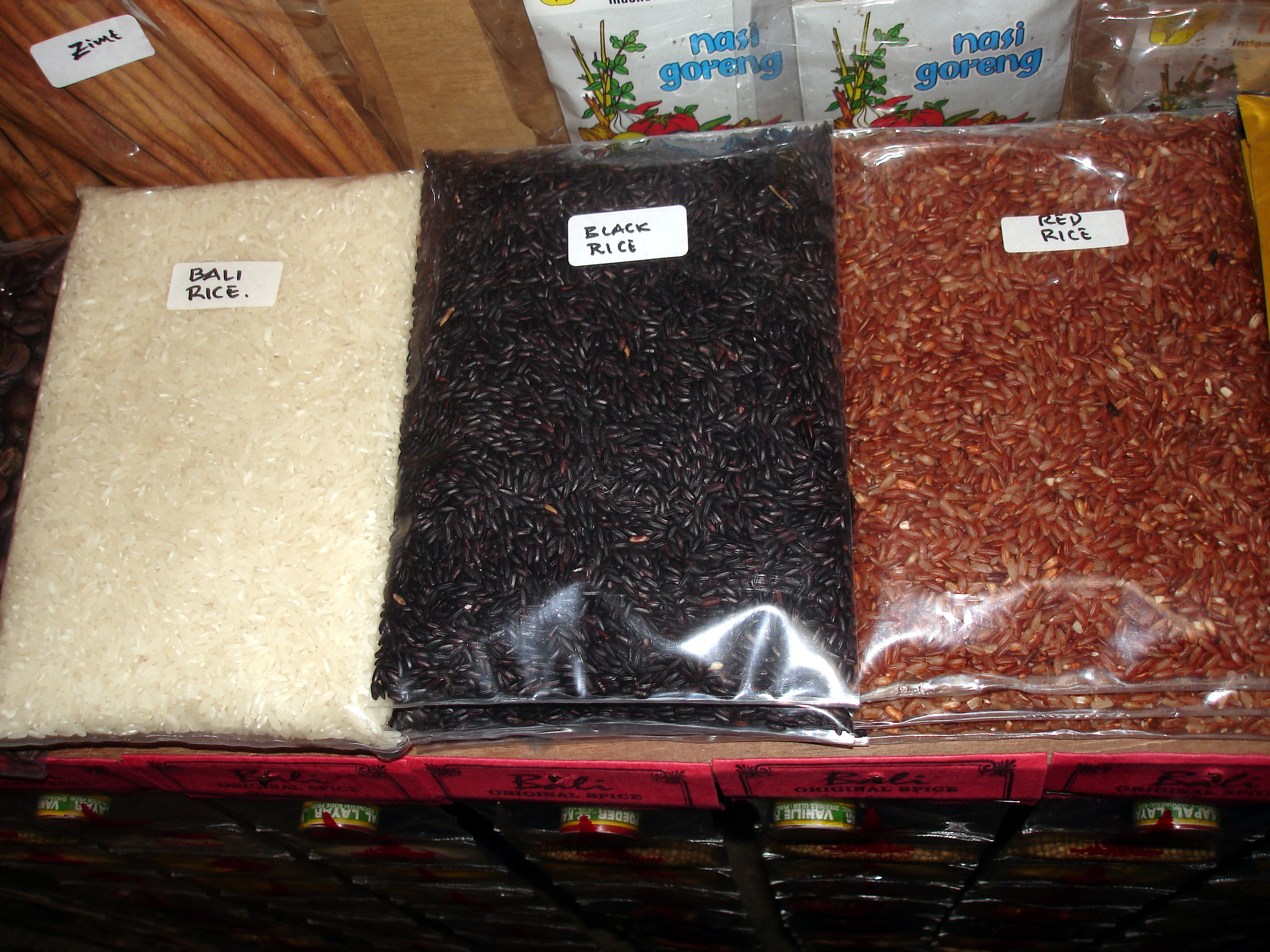 Vrste riže